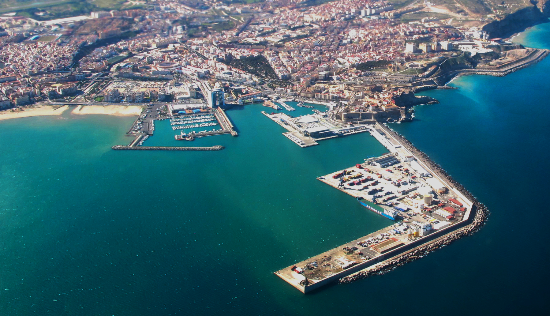 Aterrizando en Melilla